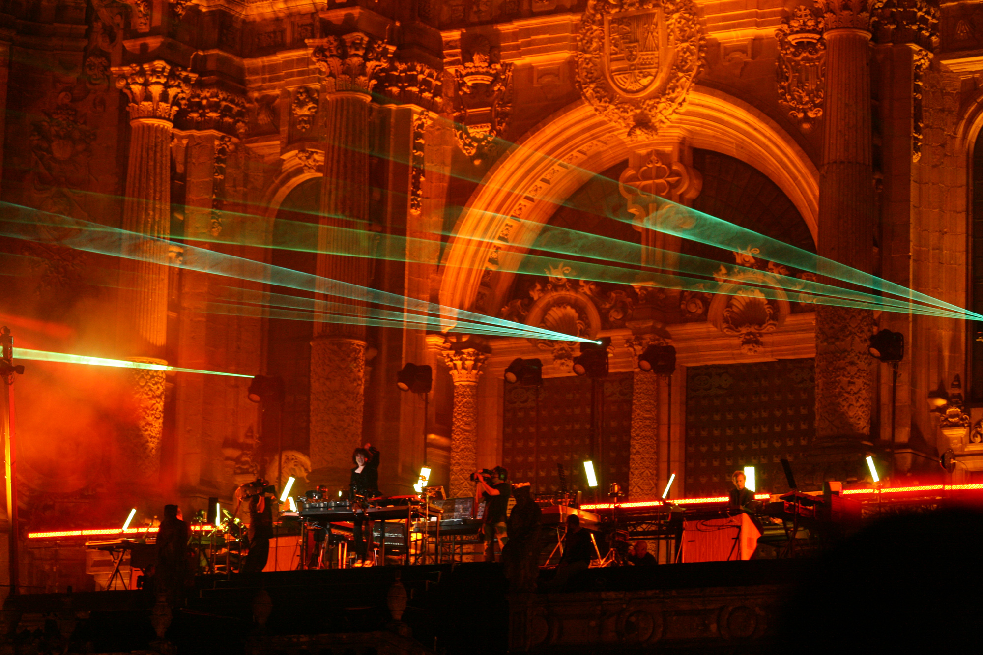 Concierto de Jean Michel Jarre en Santiago de Compostela (Galicia, España) el 31 de julio de 2010. Concert of Jean Michel Jarre Concert of Jean Michel Jarre in Santiago de Compostela (Galicia, Spain) on July 31th of 2010.